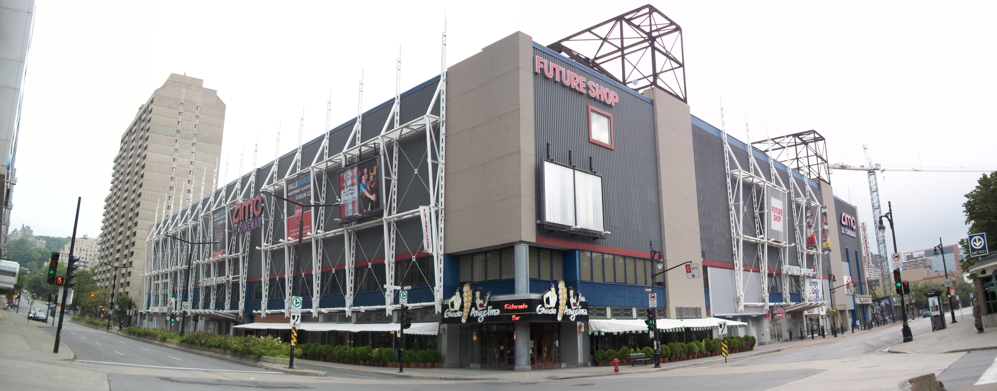 Forum Pepsi, 2310, rue Sainte-Catherine ouest, Montréal Lieu historique national du canada Notre histoire : Arenas